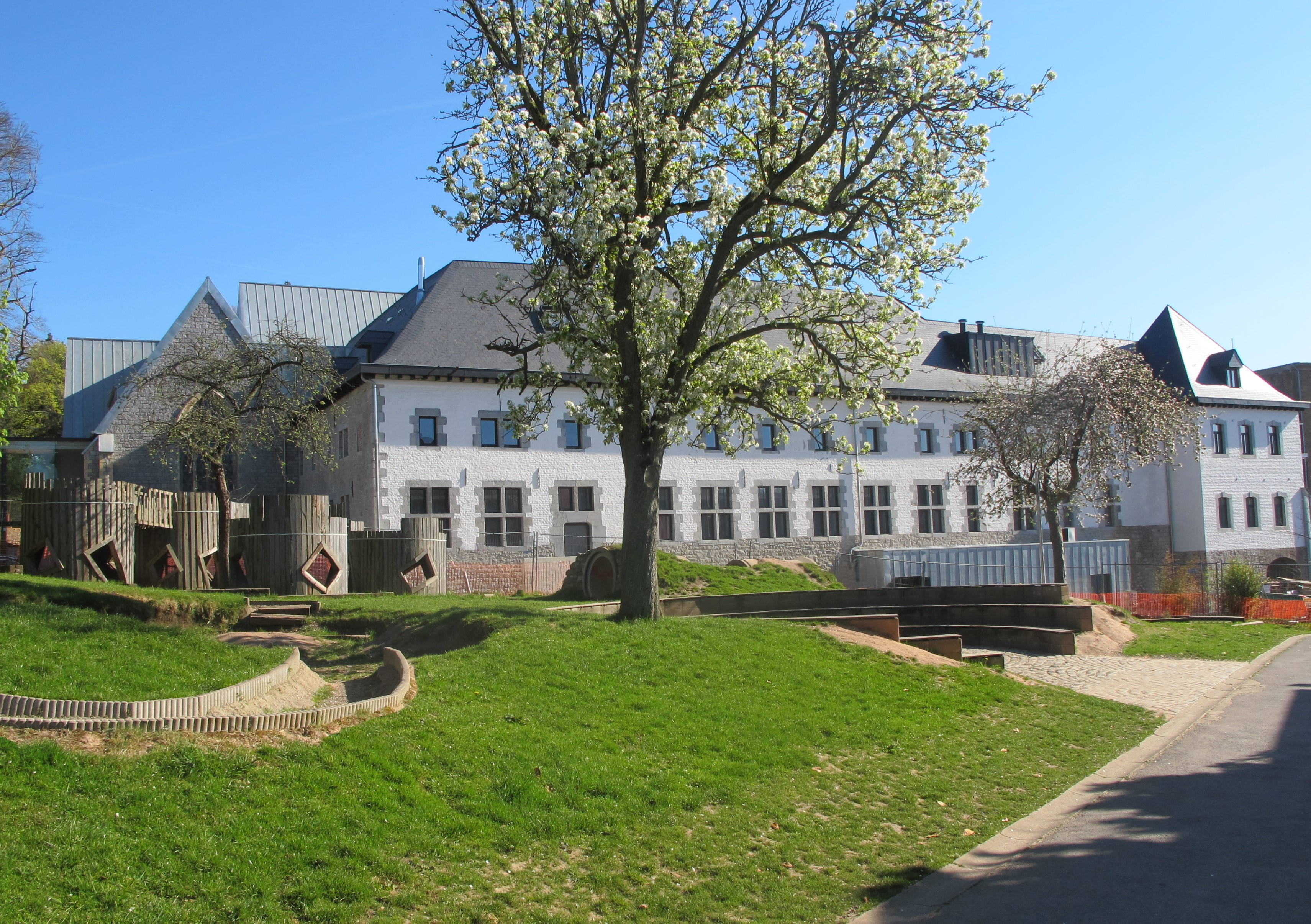 Kloster Heidberg Eupen Belgien (1700-1723)